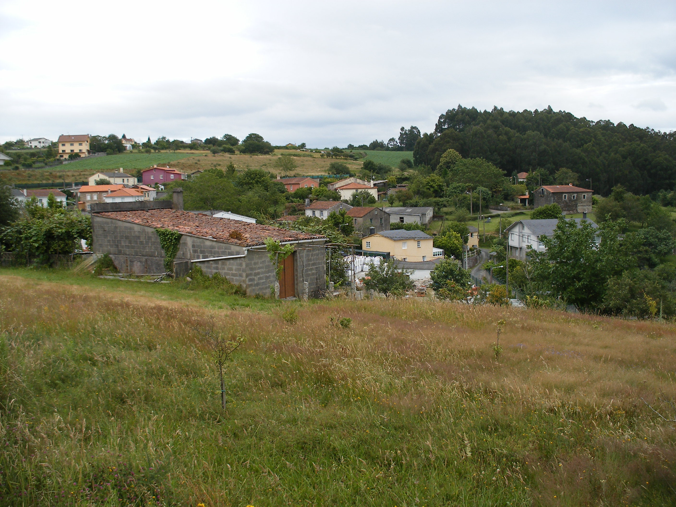 Vista da parroquia de Obre en Paderne